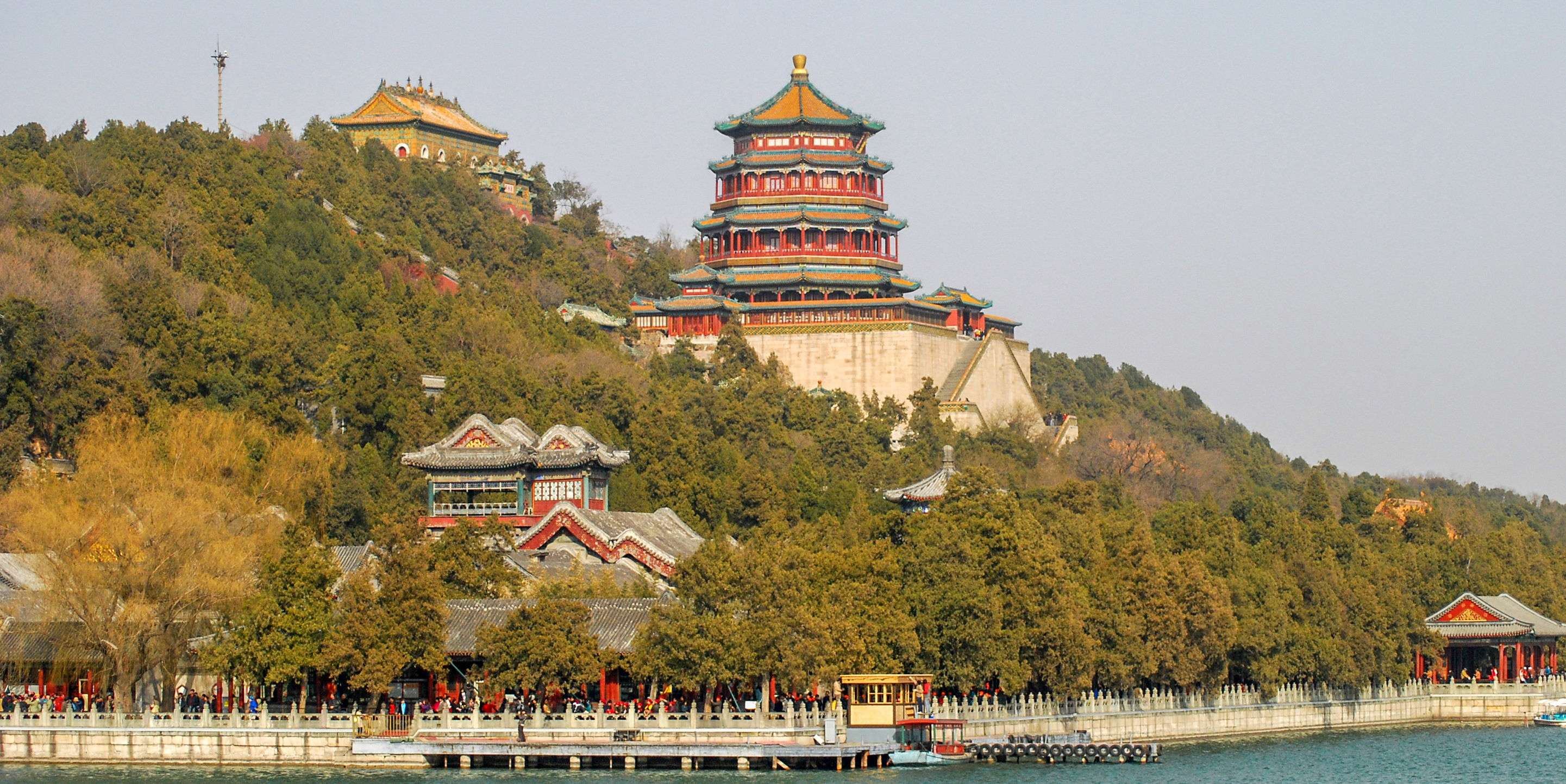 颐和园佛香阁